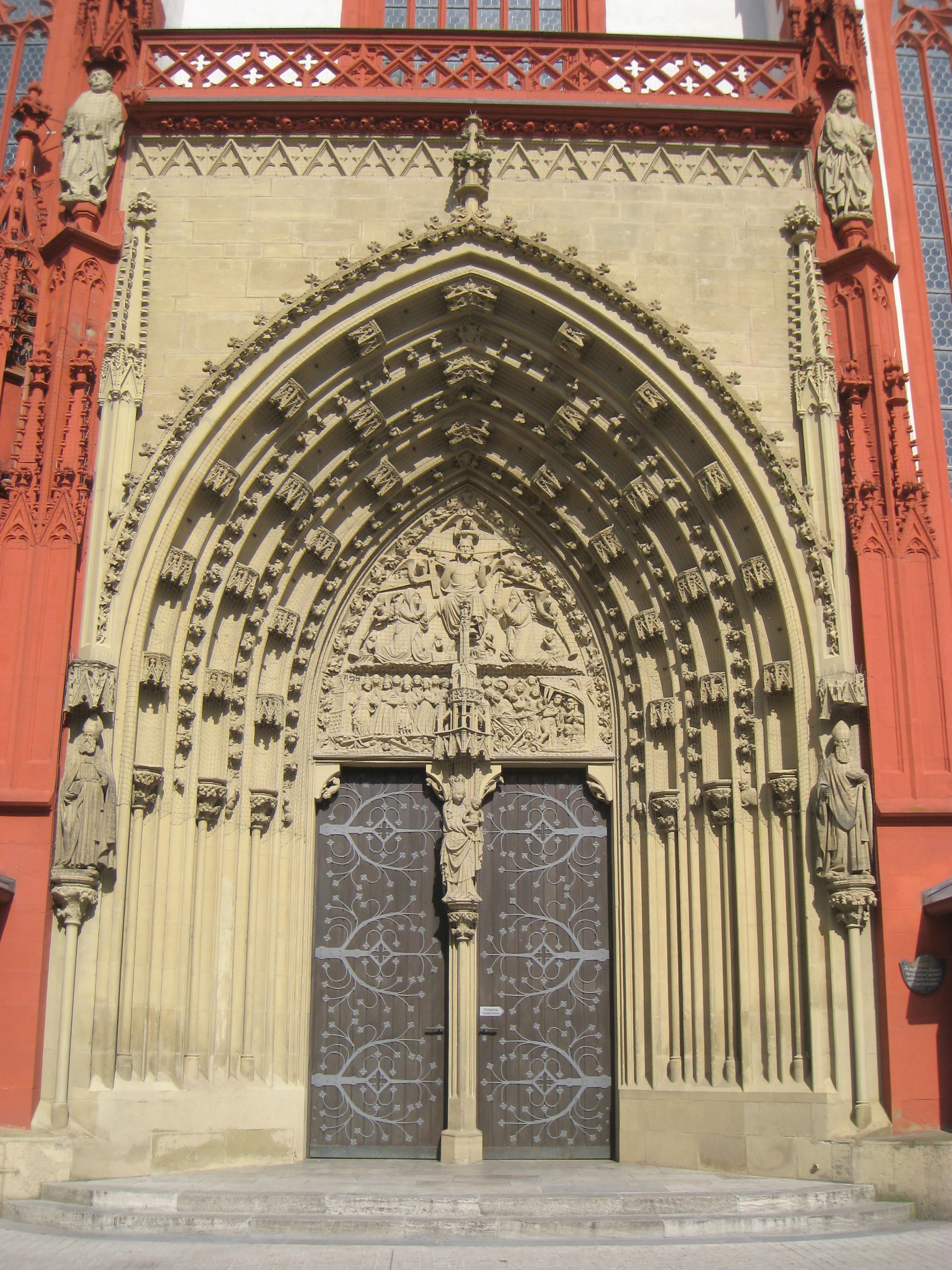 Marienkapelle, Würzburg, Germany.